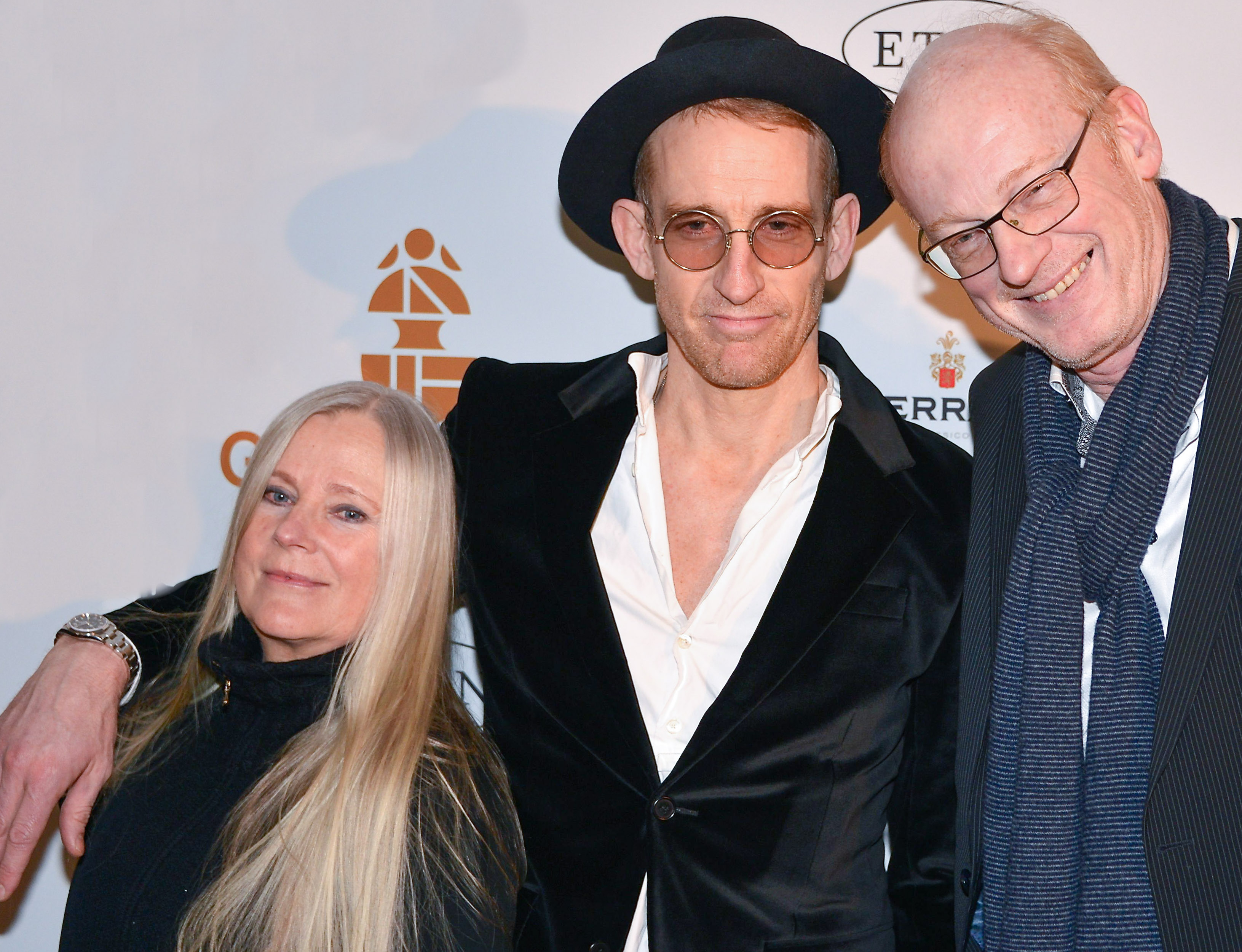 Ulla Skoog & Johan Renck på Guldbaggegalan den 21 januari 2013.